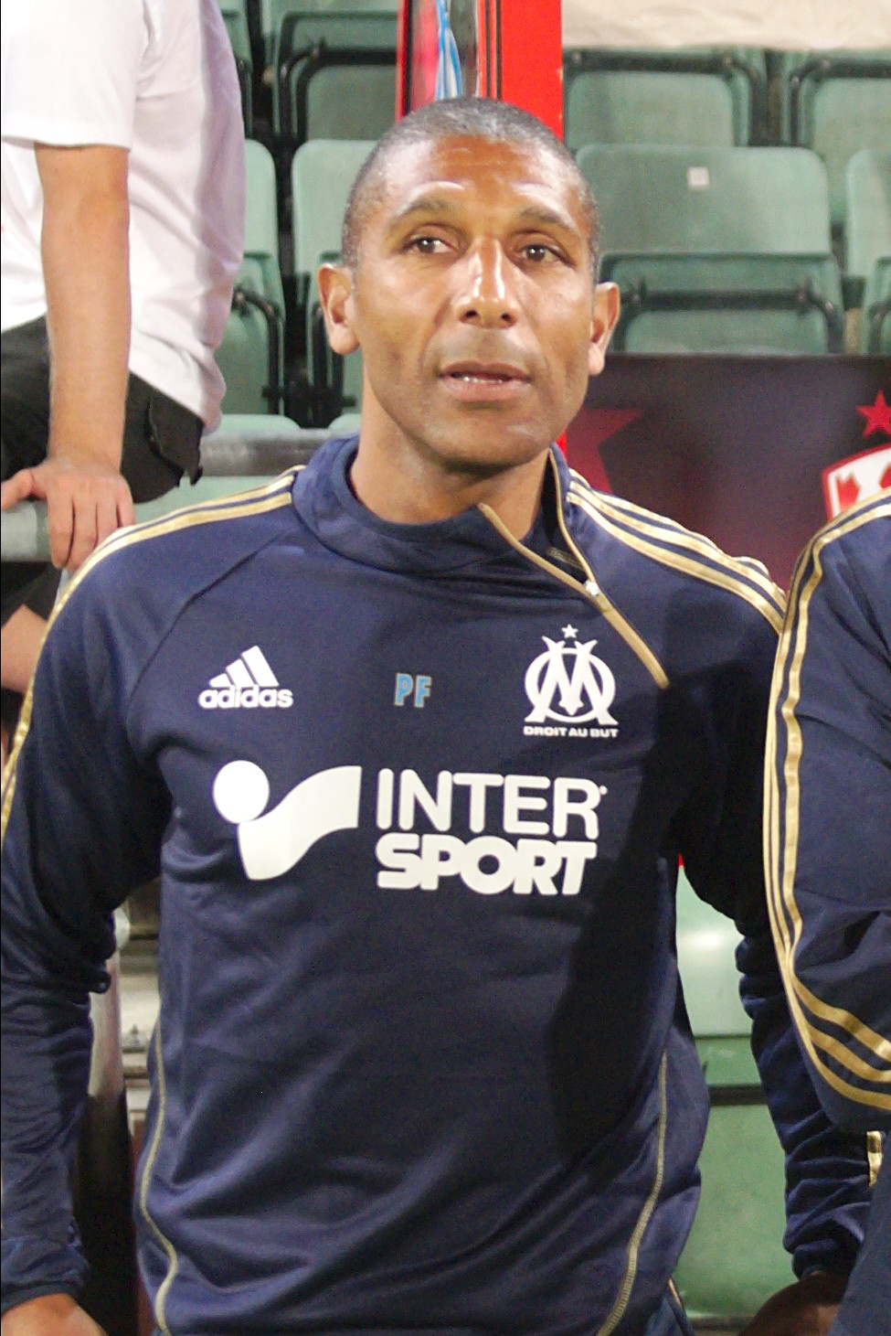 Franck Passi, 2013 (crop).